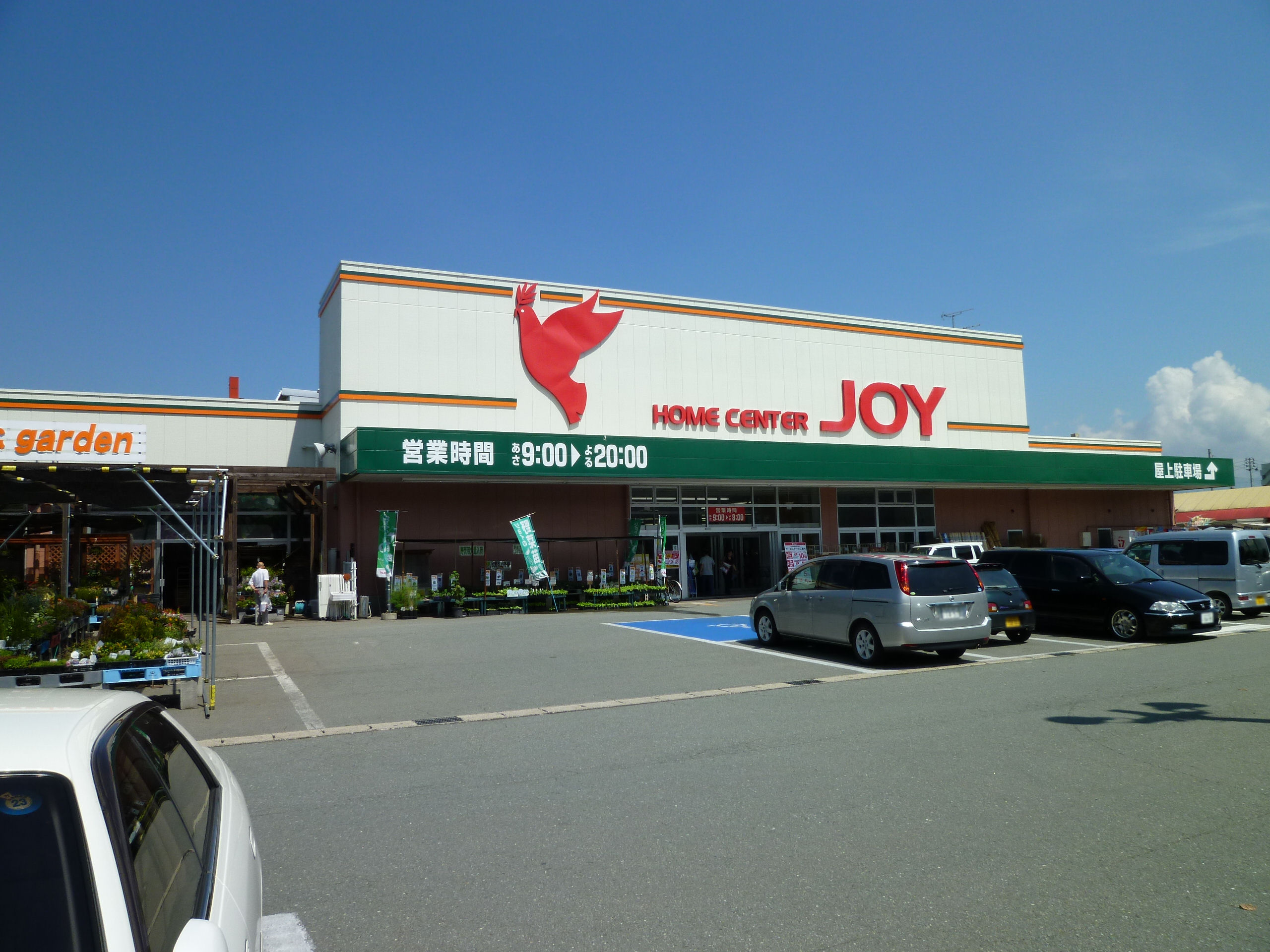 ホームセンタージョイ 山形北店